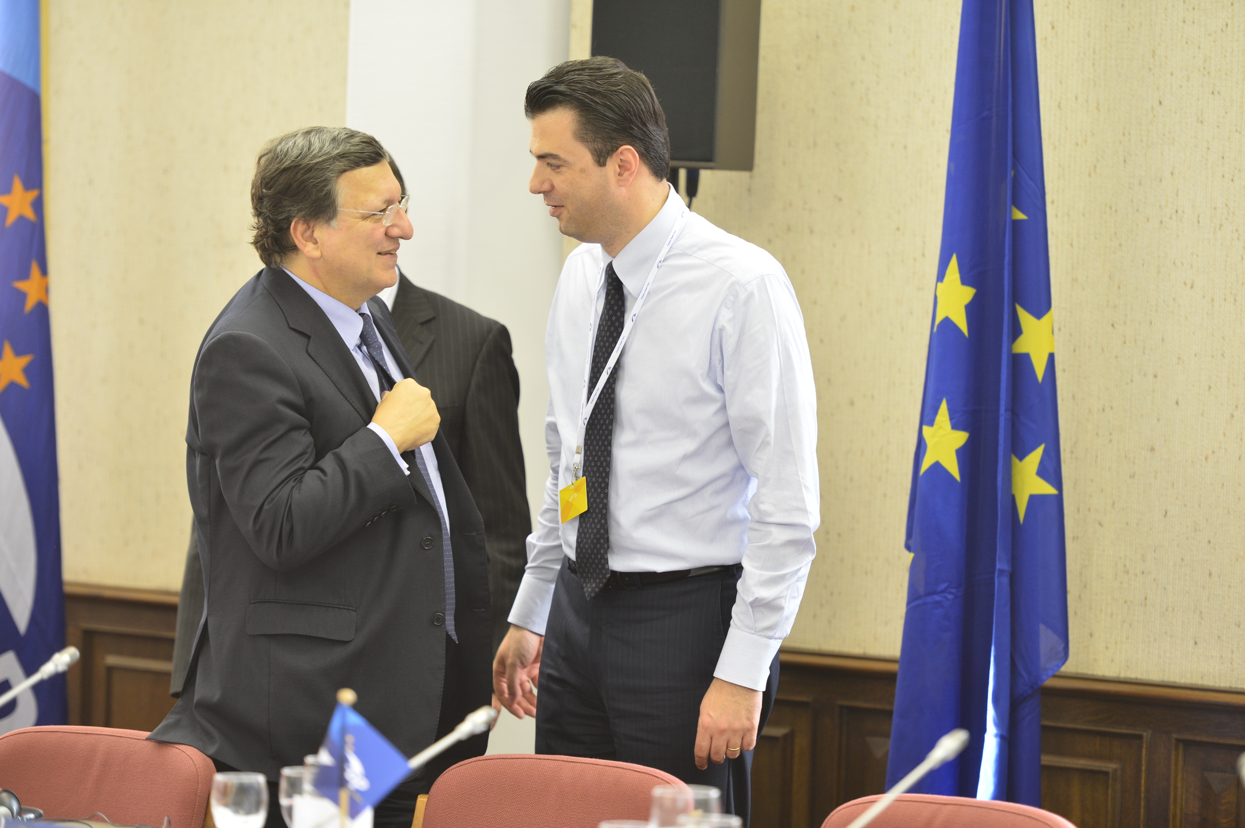 EPP Summit, Meise. Oct. 2013